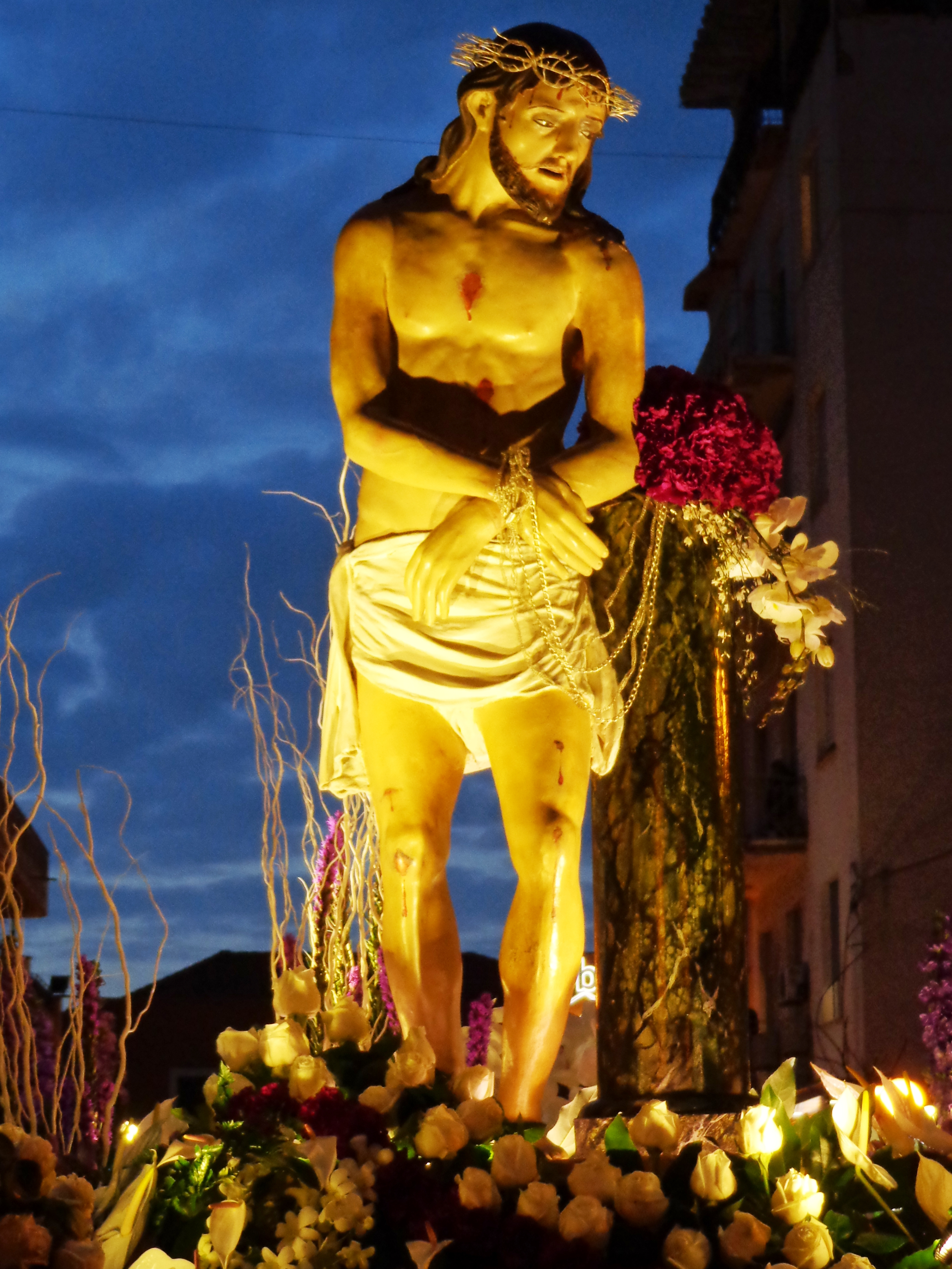 Varette_2015_16